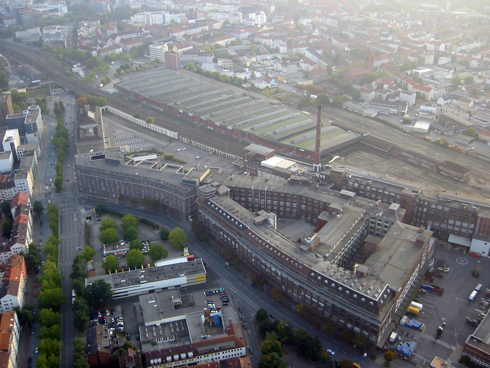 Conti Werk / Verwaltung Hannover Vahrenwalder Strasse